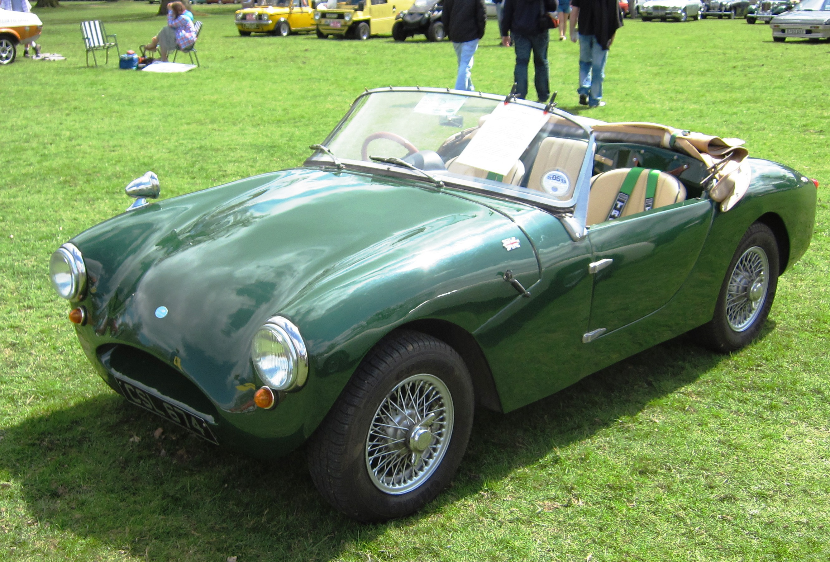 Fairthorpe Electron Minor